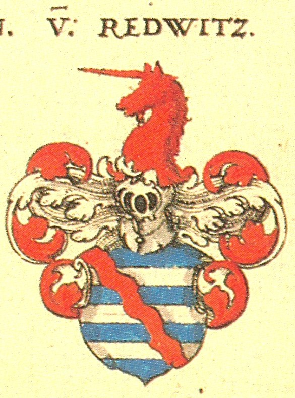 Wappen der Fränkischen Adelsfamilie Redwitz.